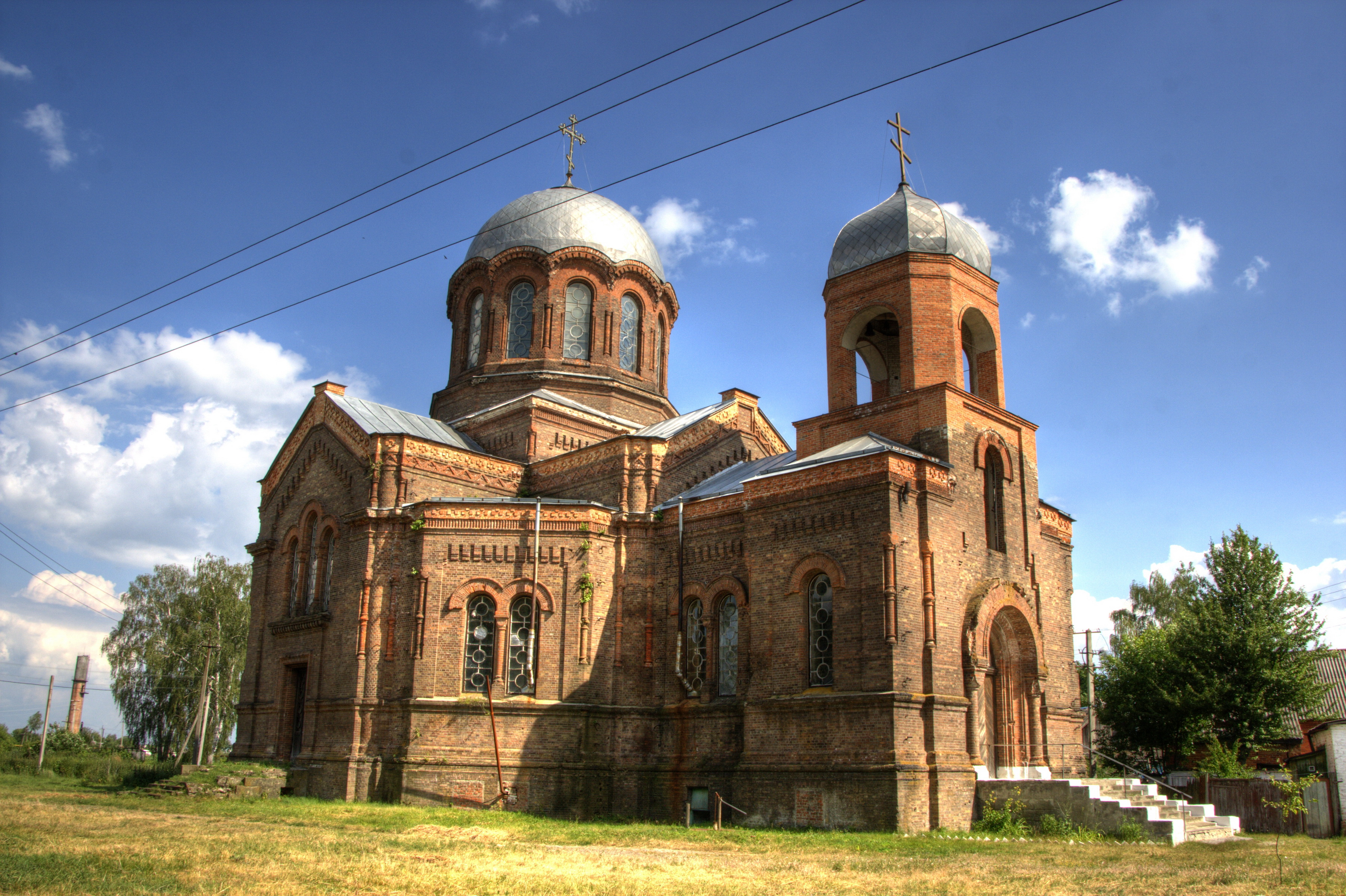 Церква Різдва Богородиці, смт Низи, вул. Волочаєвська, 78